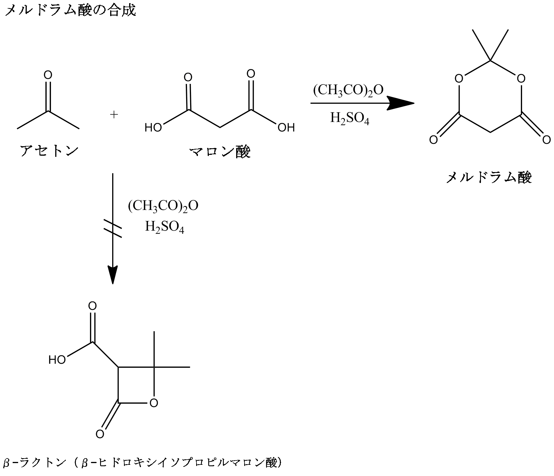 Meldrum's_acid_synthesis.pngの翻訳